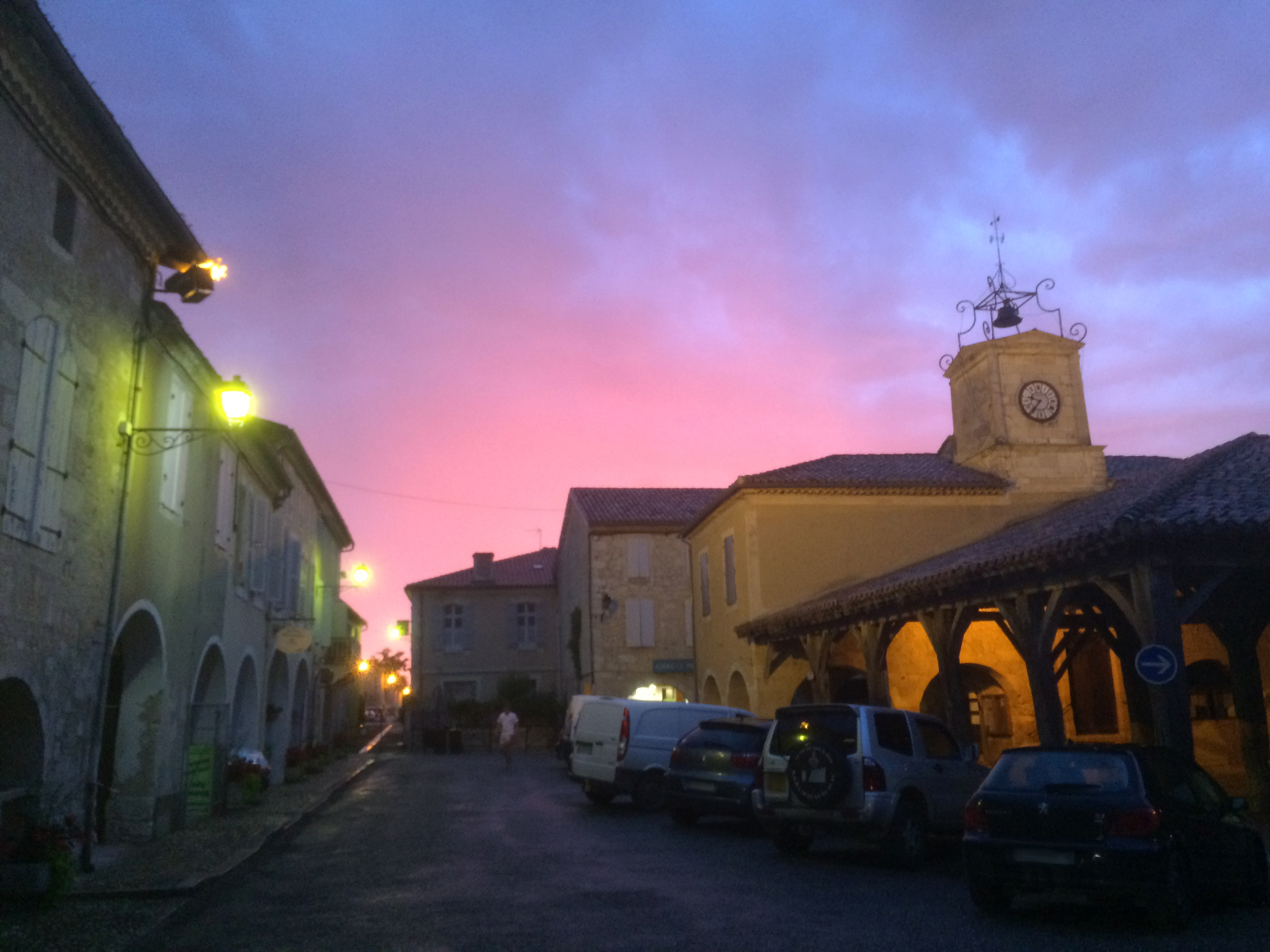 Halles de Saint-Clar, crépuscule.